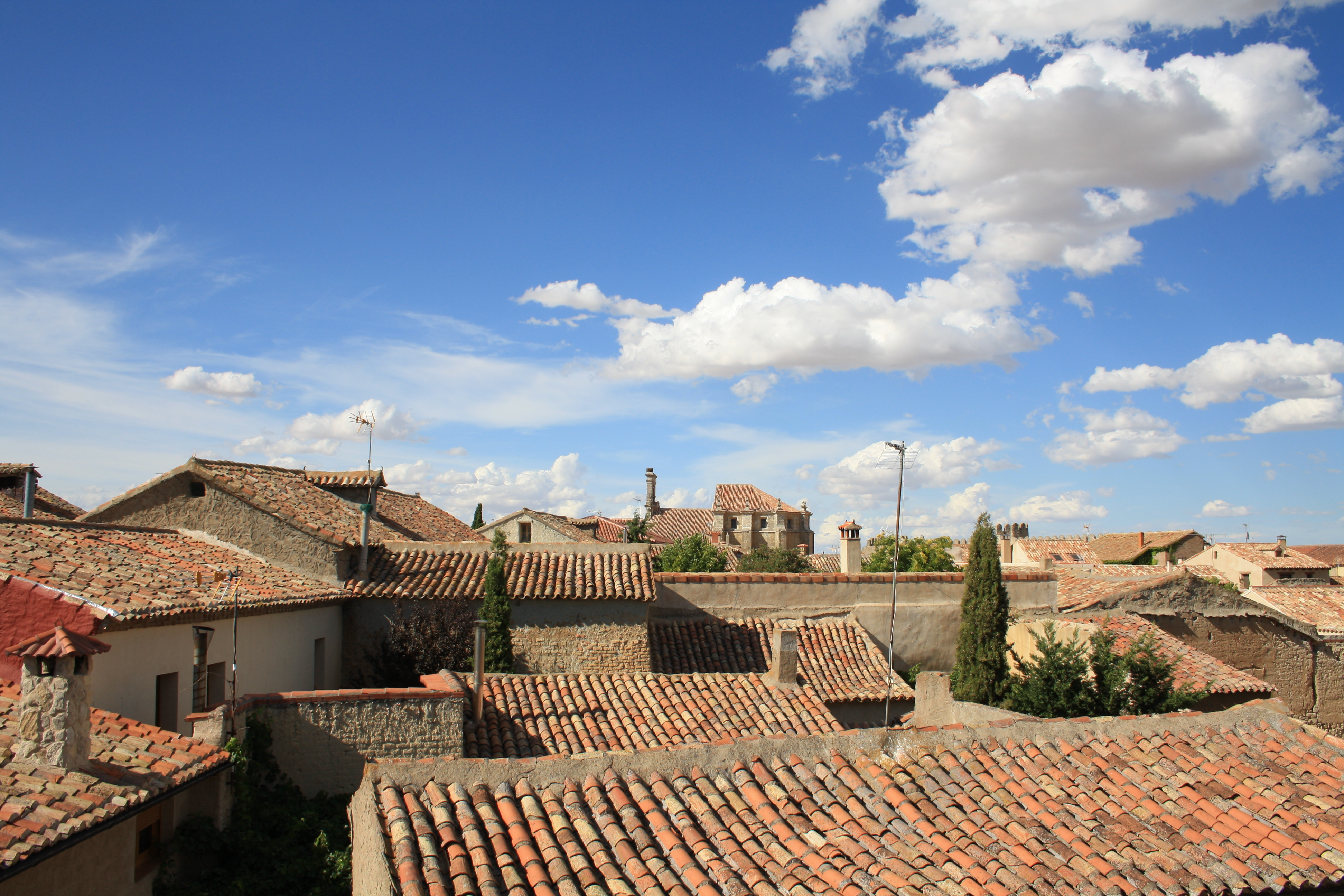 Vista de Urueña, Espana.